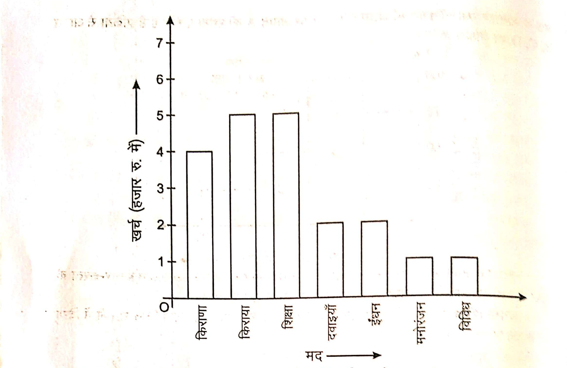 दंड आलेख